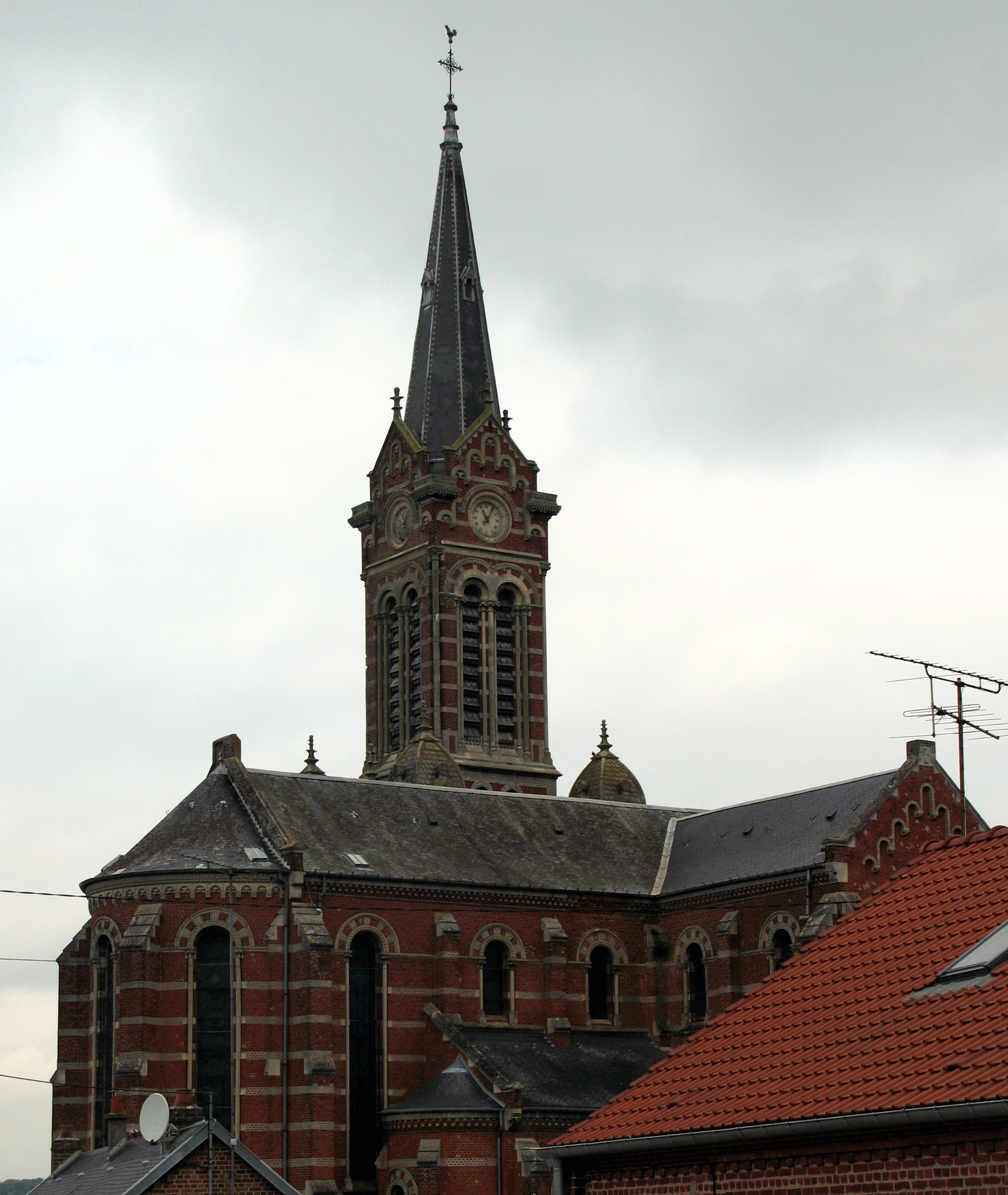 Ailly-sur-Noye (Somme, France) - Eglise vue depuis la rue vers Montdidier. Cette "Rue de Louvrechy" est en fait le début de la route départementale D26.